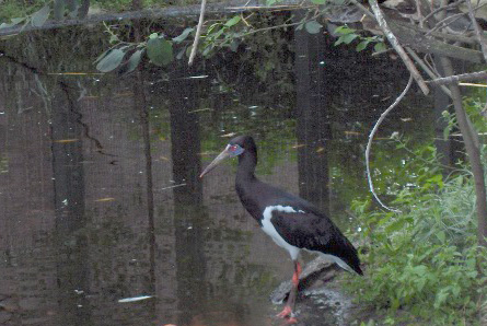 Species Ciconia abdimii Familia Ciconiidae